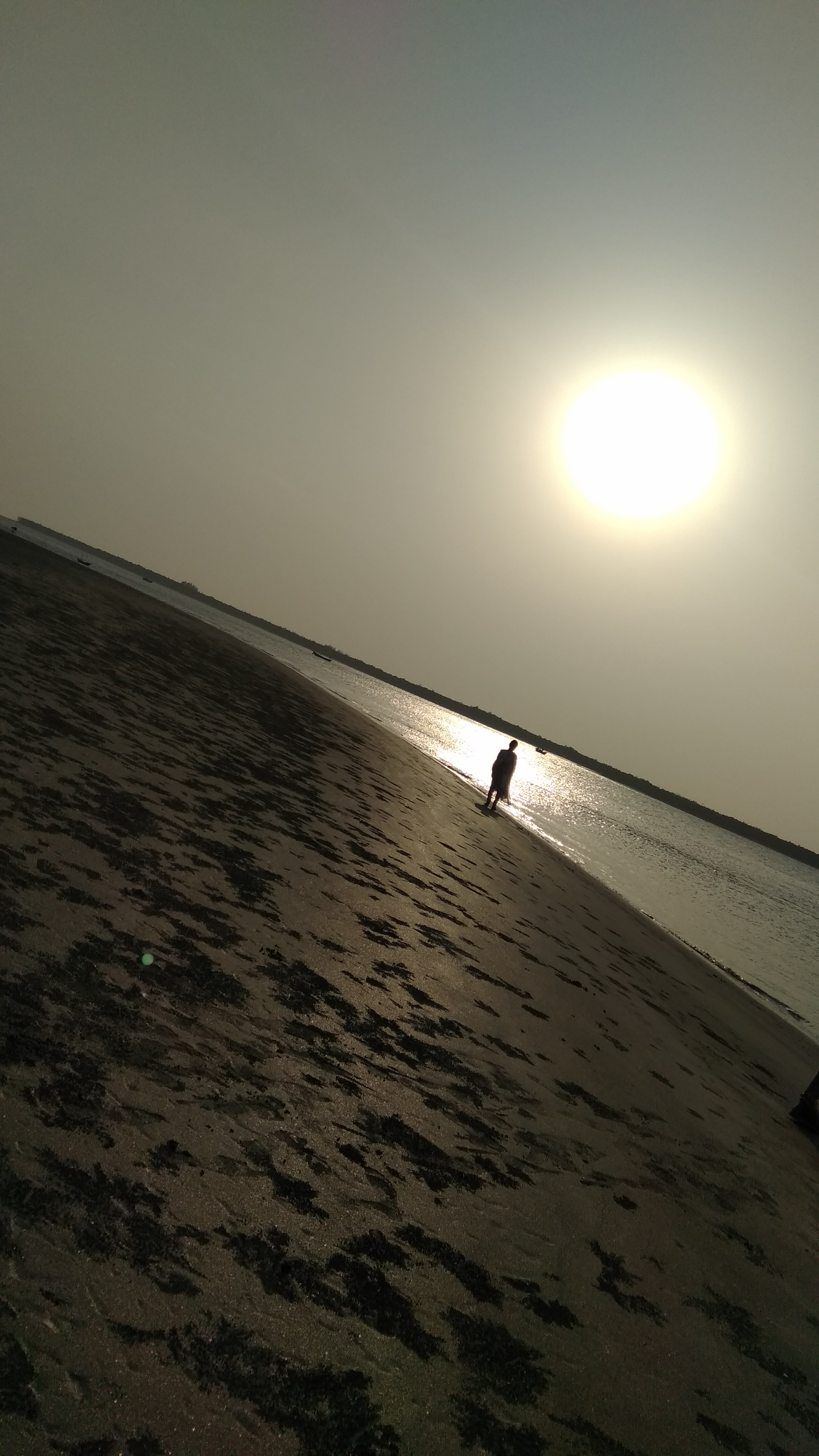 কুয়াকাটা ইকোপার্ক